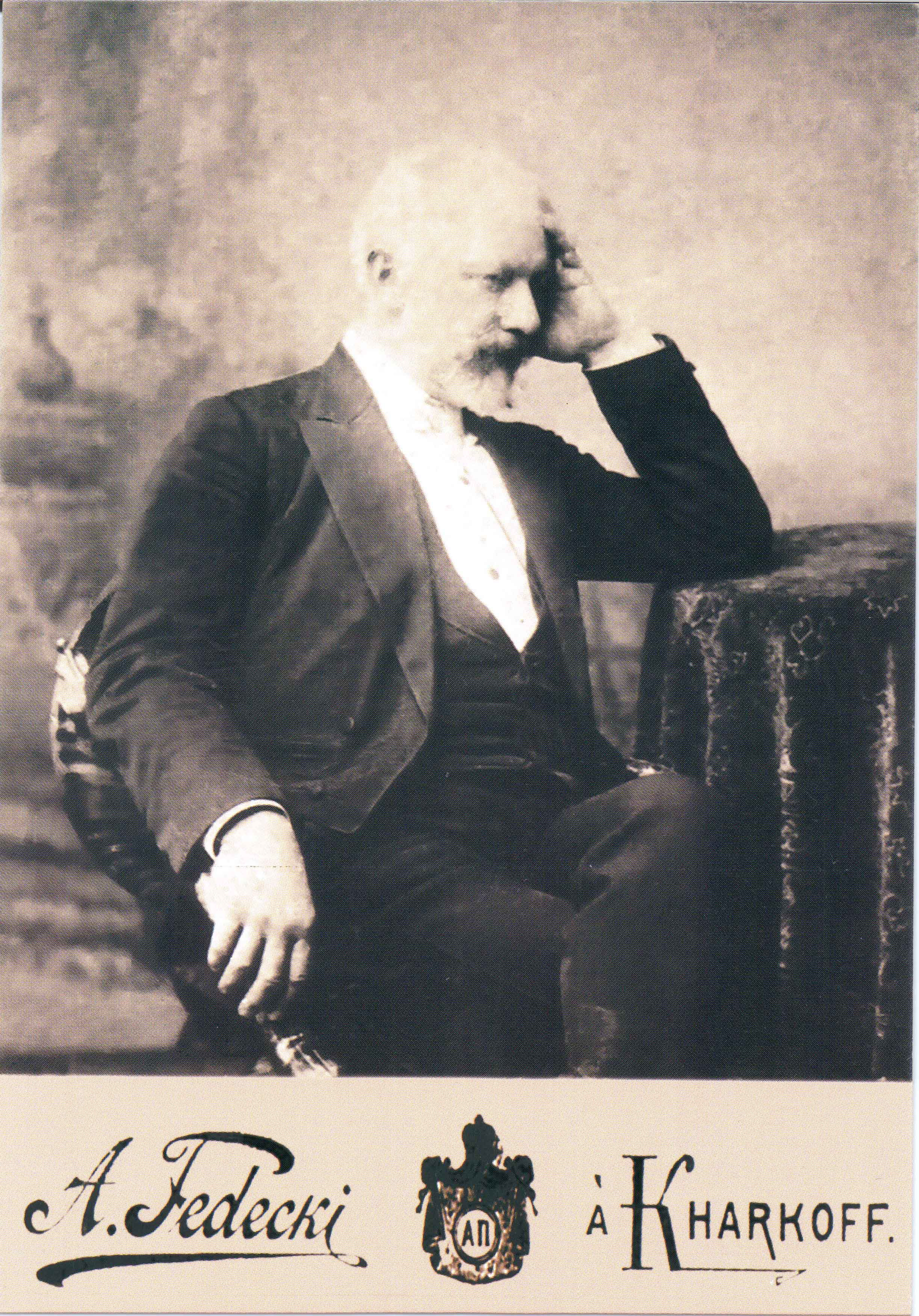 Pyotr Ilyich Tchaikovsky in Kharkov. 1893